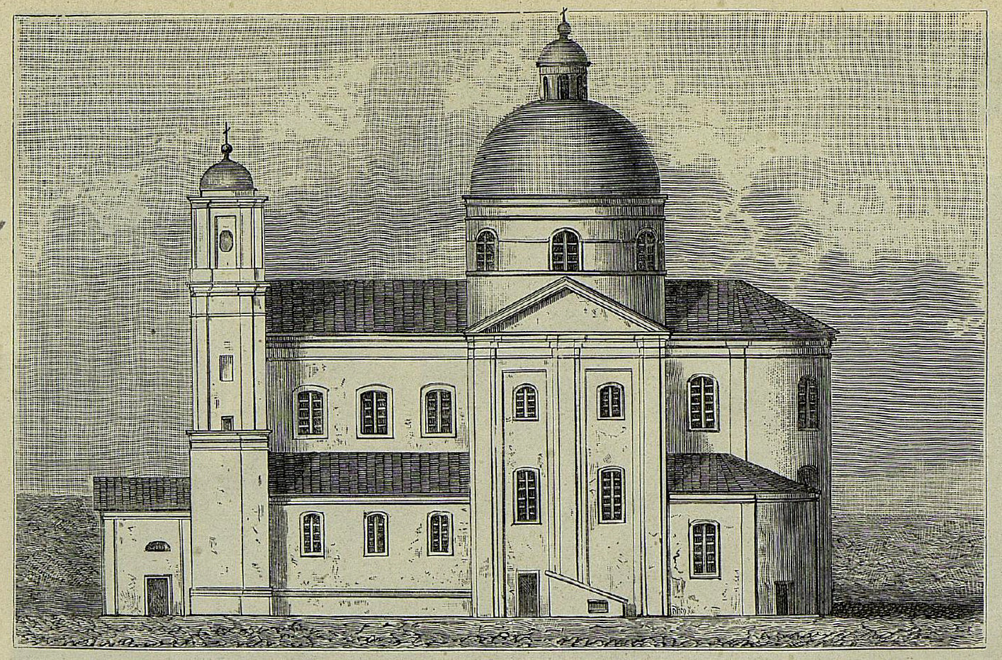 Беларуская (тарашкевіца): Вільня (Vilnia). Царква саборная Сьвятога Духу